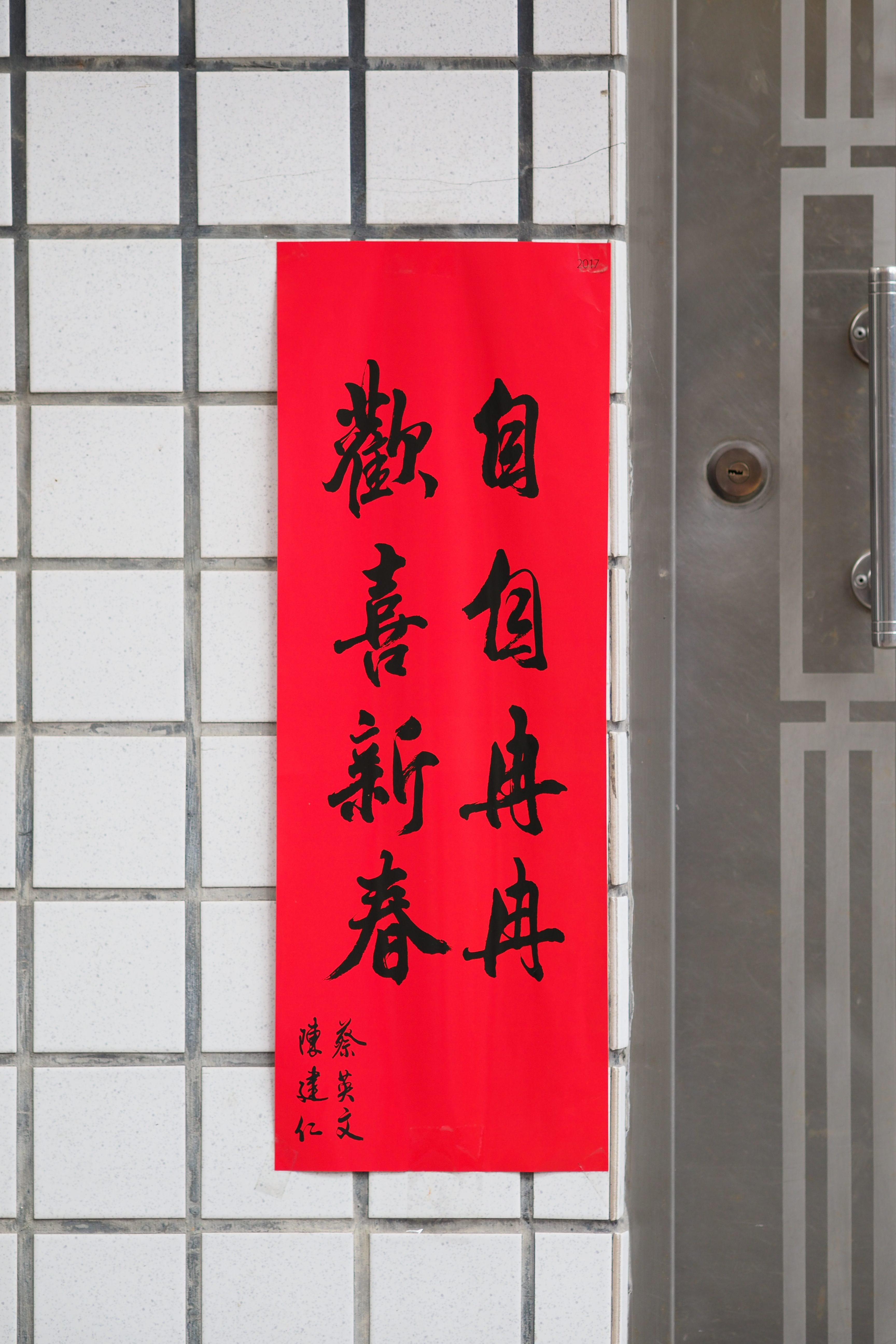 2017年中華民國總統府春聯「自自冉冉，歡喜新春」，總統蔡英文與副總統陳建仁署名。